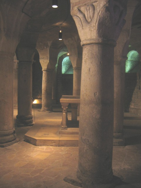 Crypte de la cathédrale de Dijon, Bourgogne, France.